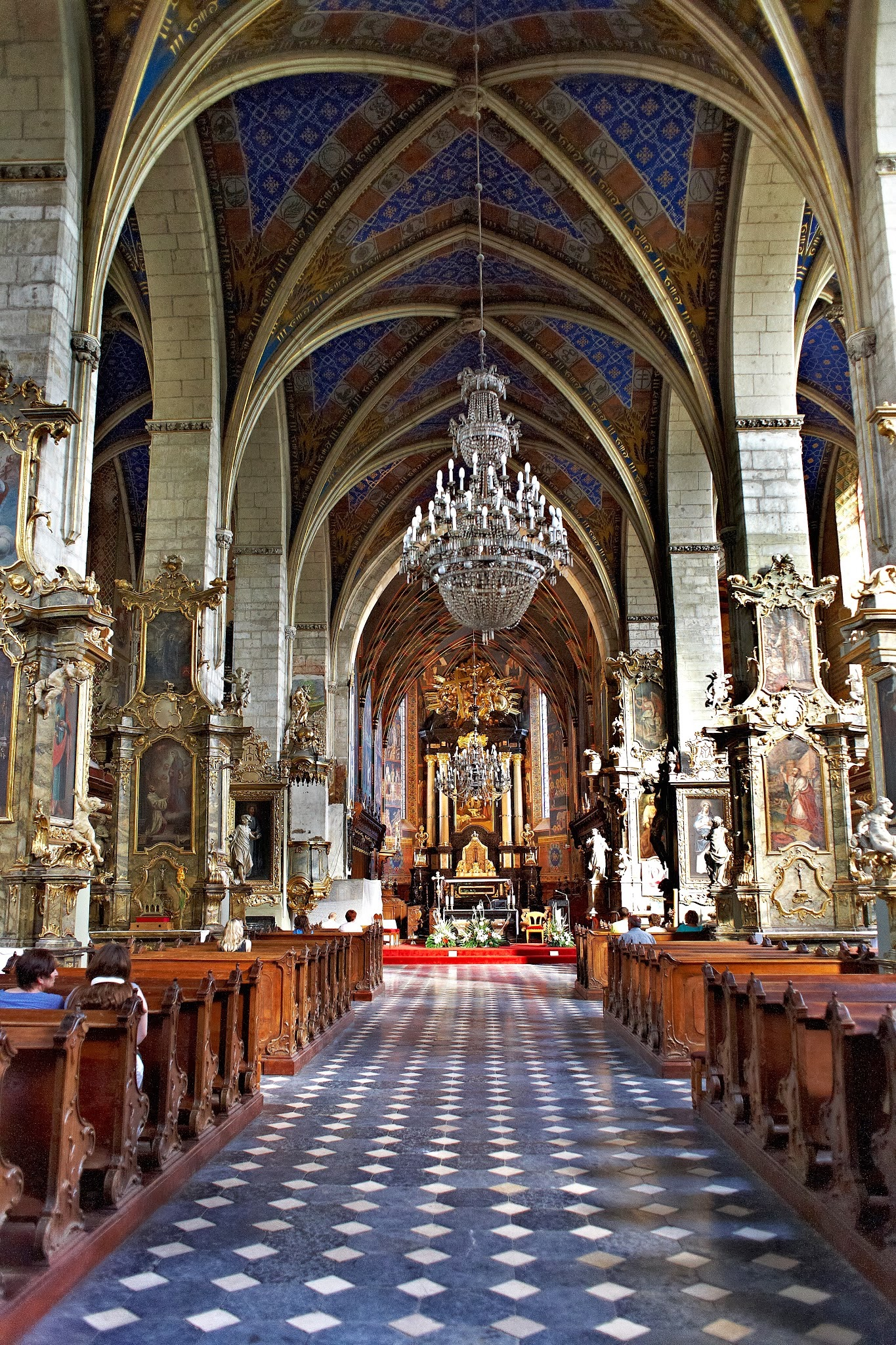 Sandomierz, ul. Katedralna 1 - kościół katedralny pw. Narodzenia NMP, XIV, XIX w